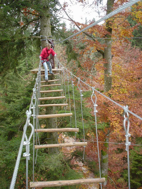 Seilpark Gantrisch